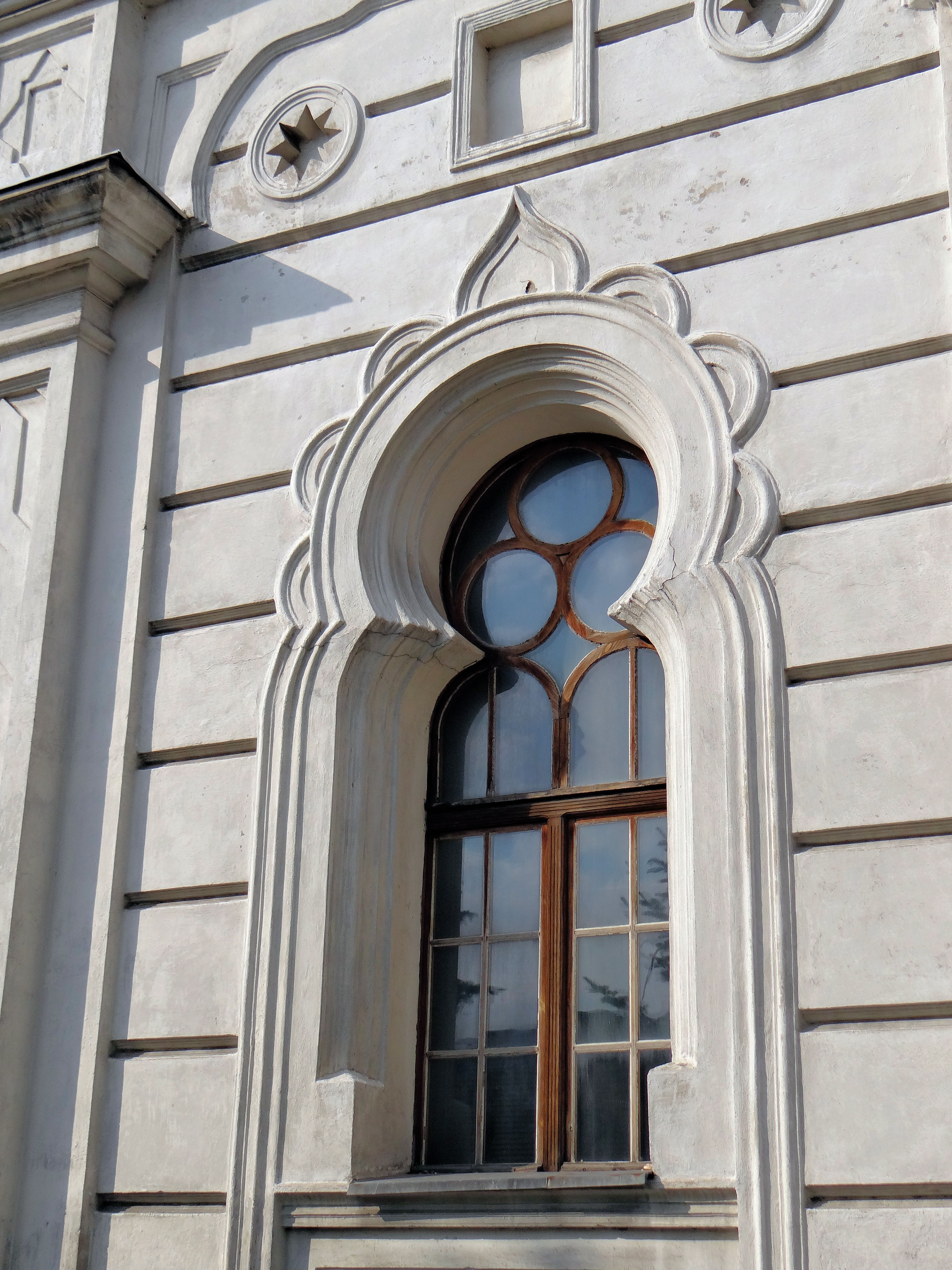 Synagoga w Koninie - ul Mickiewicza 6